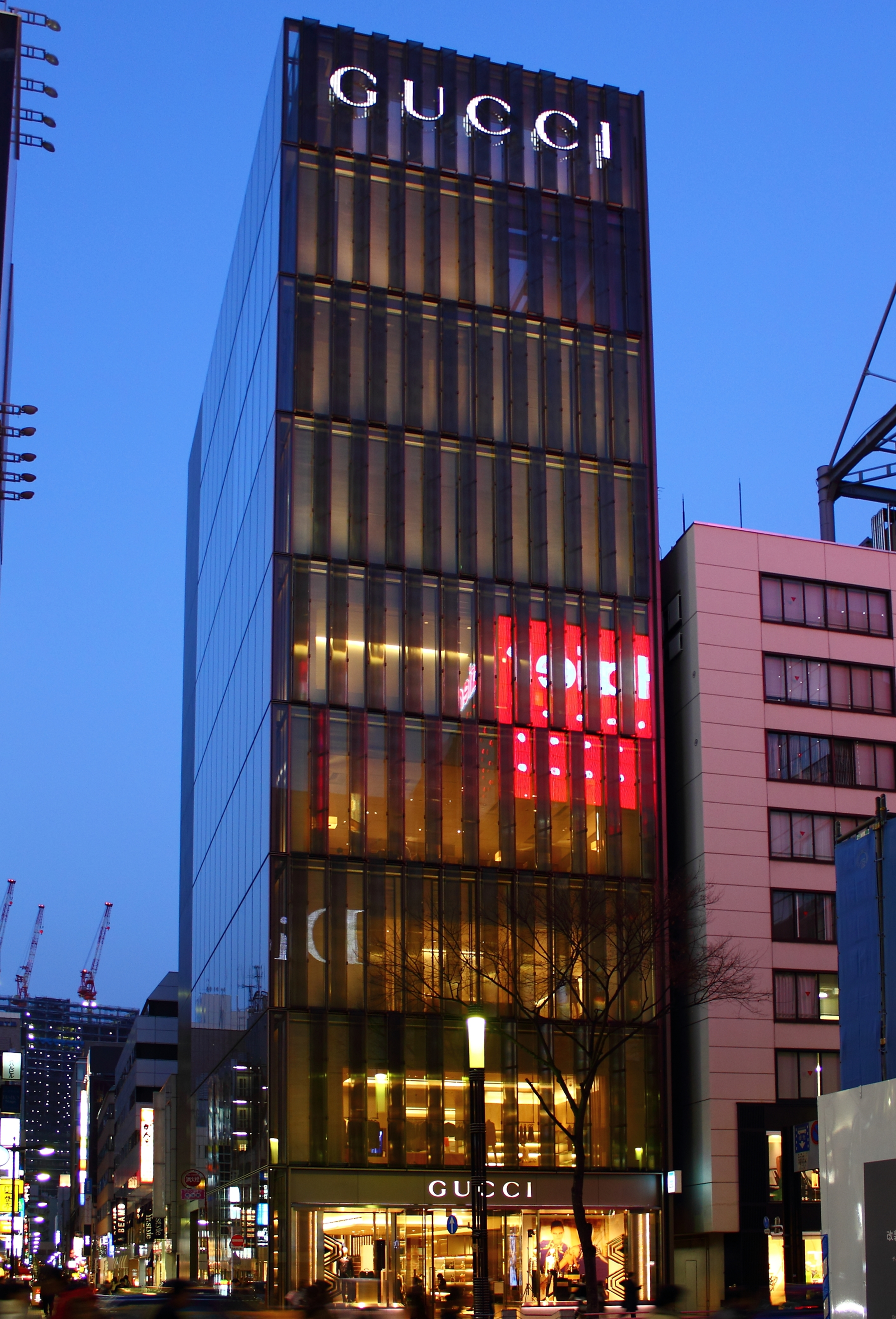 グッチ銀座